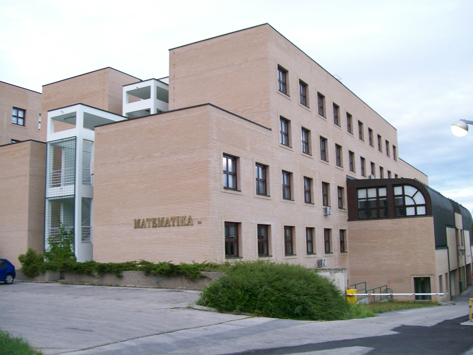 Zgrada Prirodoslovno-matematičkog fakulteta u Zagrebu, Matematički odsjek